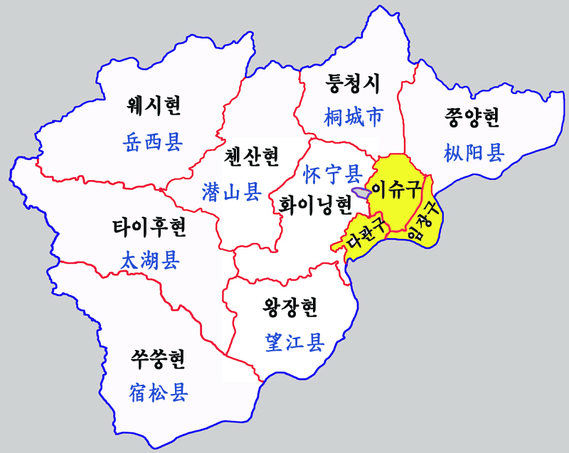 안칭시 현급행정구역